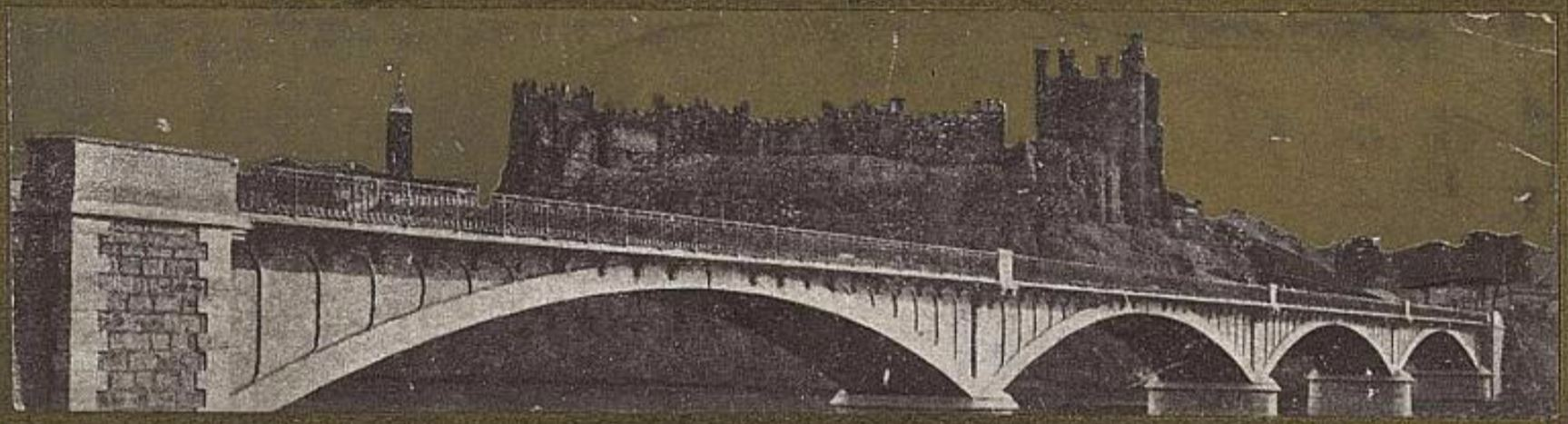 Puente de Valencia de Don Juan según dibujo del catálogo de José Eugenio Ribera